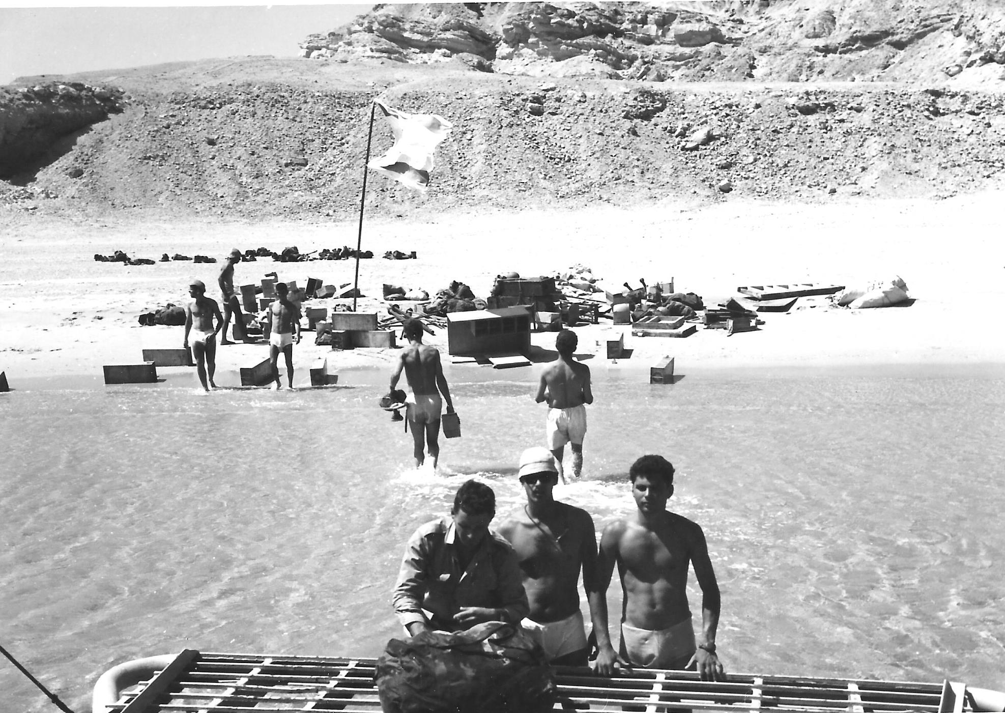 אנשי חיל הים מקימים בסיס על האי טירן במלחמת ששת הימים יוני 1967